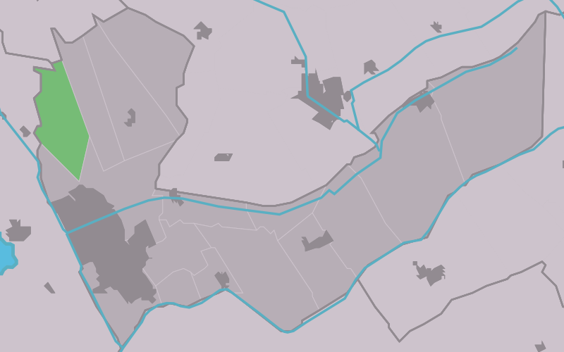 Kaartsje fan himrik fan Terbant